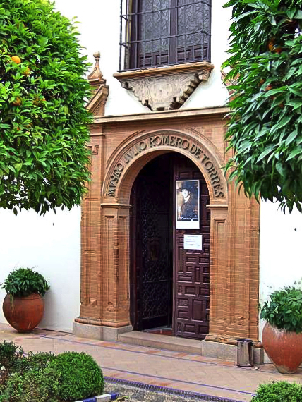 Puerta de acceso al Museo Julio Romero de Torres en Córdoba (España).